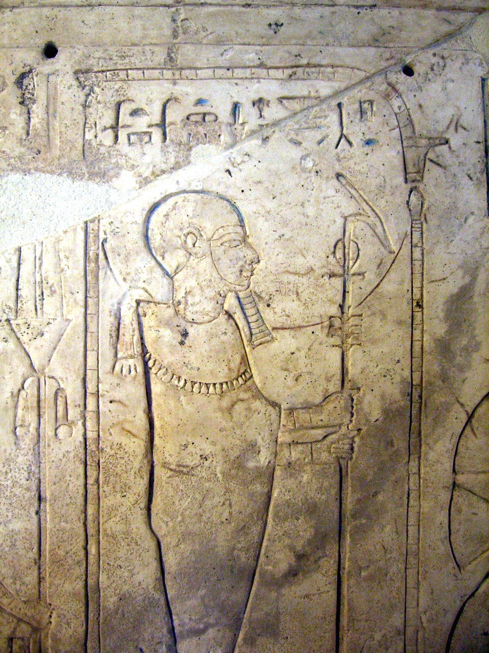 Le dieu Ptah - Détail du relief du grand prêtre Chedsounéfertoum - Règne de Chechanq Ier - XXIIe dynastie égyptienne - musée du Louvre / Casio EX-S500